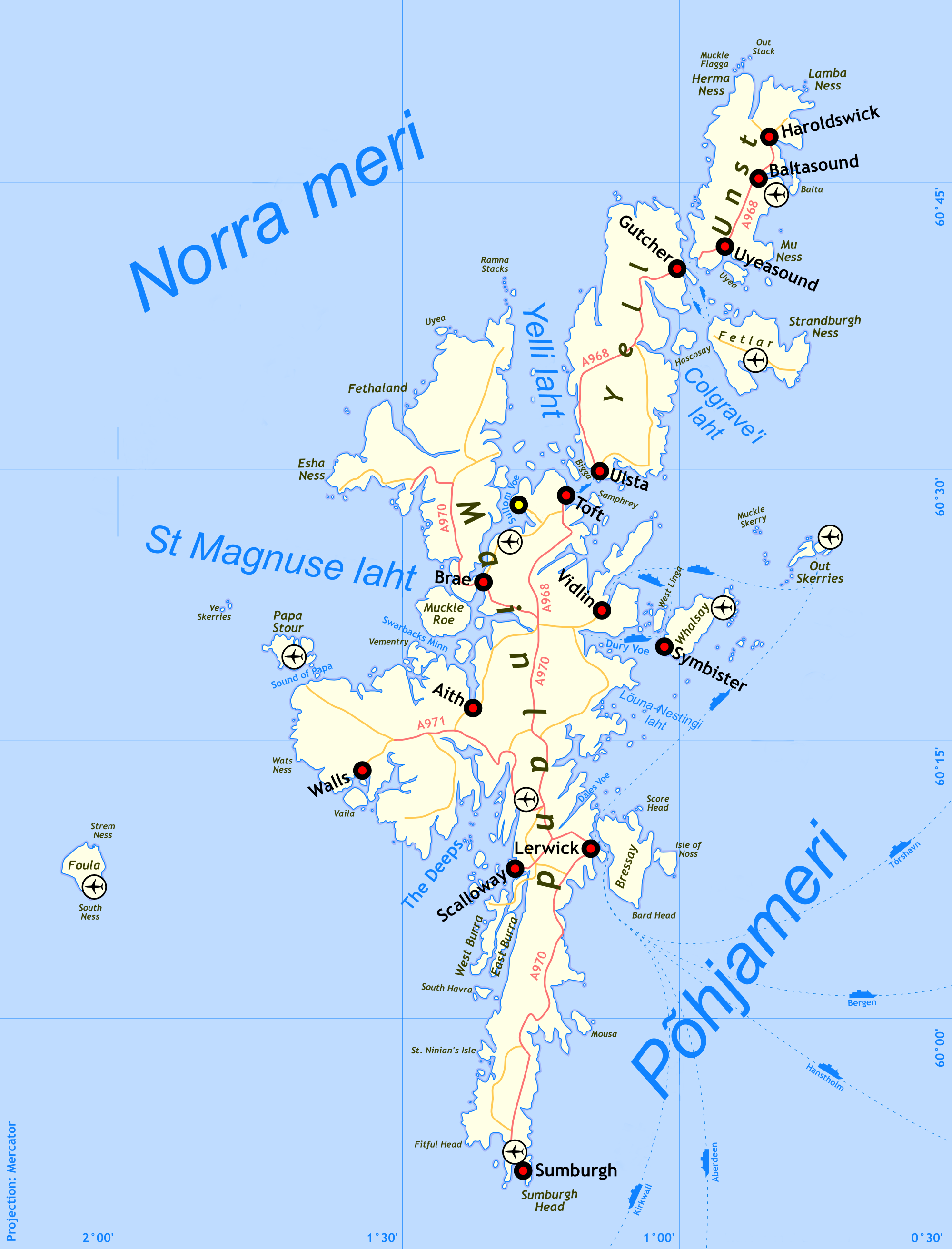 Shetlandi saarte kaart